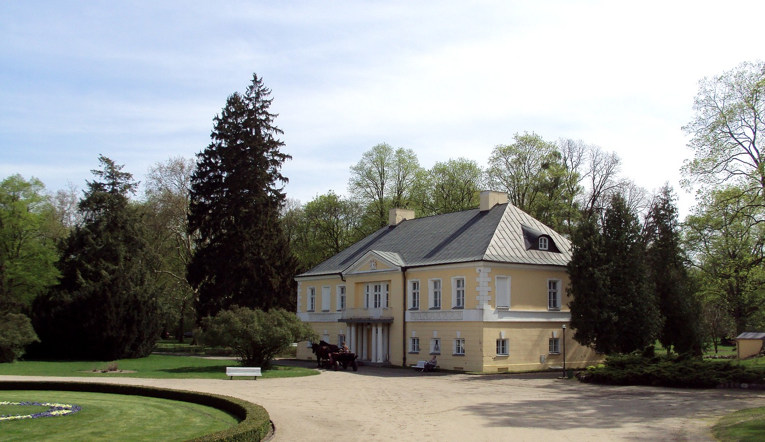 Oficyna pałacu w Lubostroniu